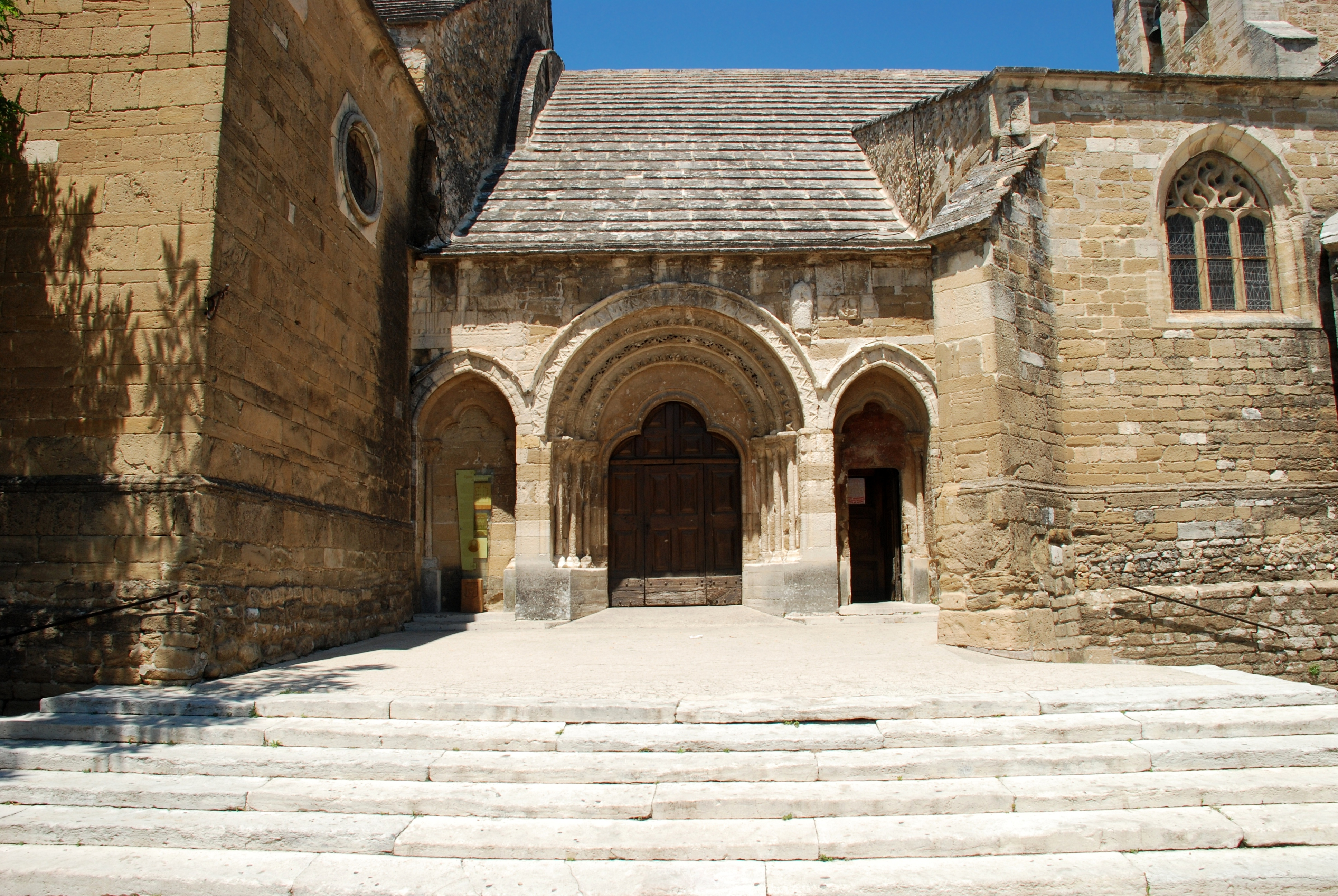 France - Provence - Église Notre-Dame-de-Nazareth de Valréas